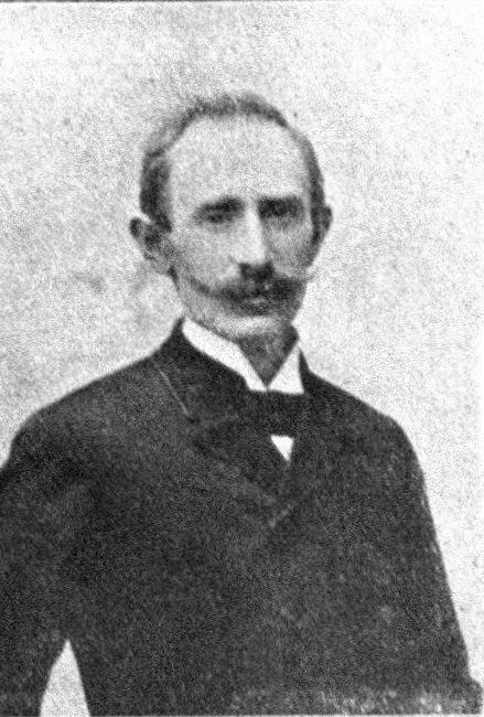 Österreichischer Politiker, Reichsratswahl 1907, Name siehe Dateiname